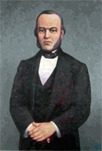 Mariano Yáñez, Óleo sobre tela 98x74 cm